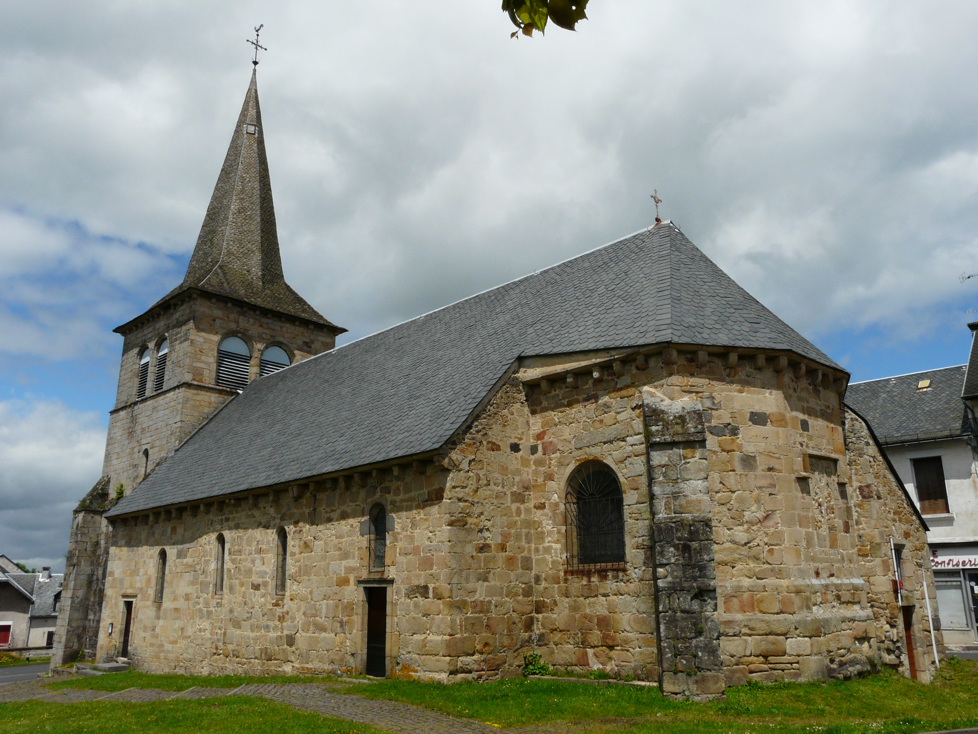 L'église Saint-Pierre de Messeix, Puy-de-Dôme, France.